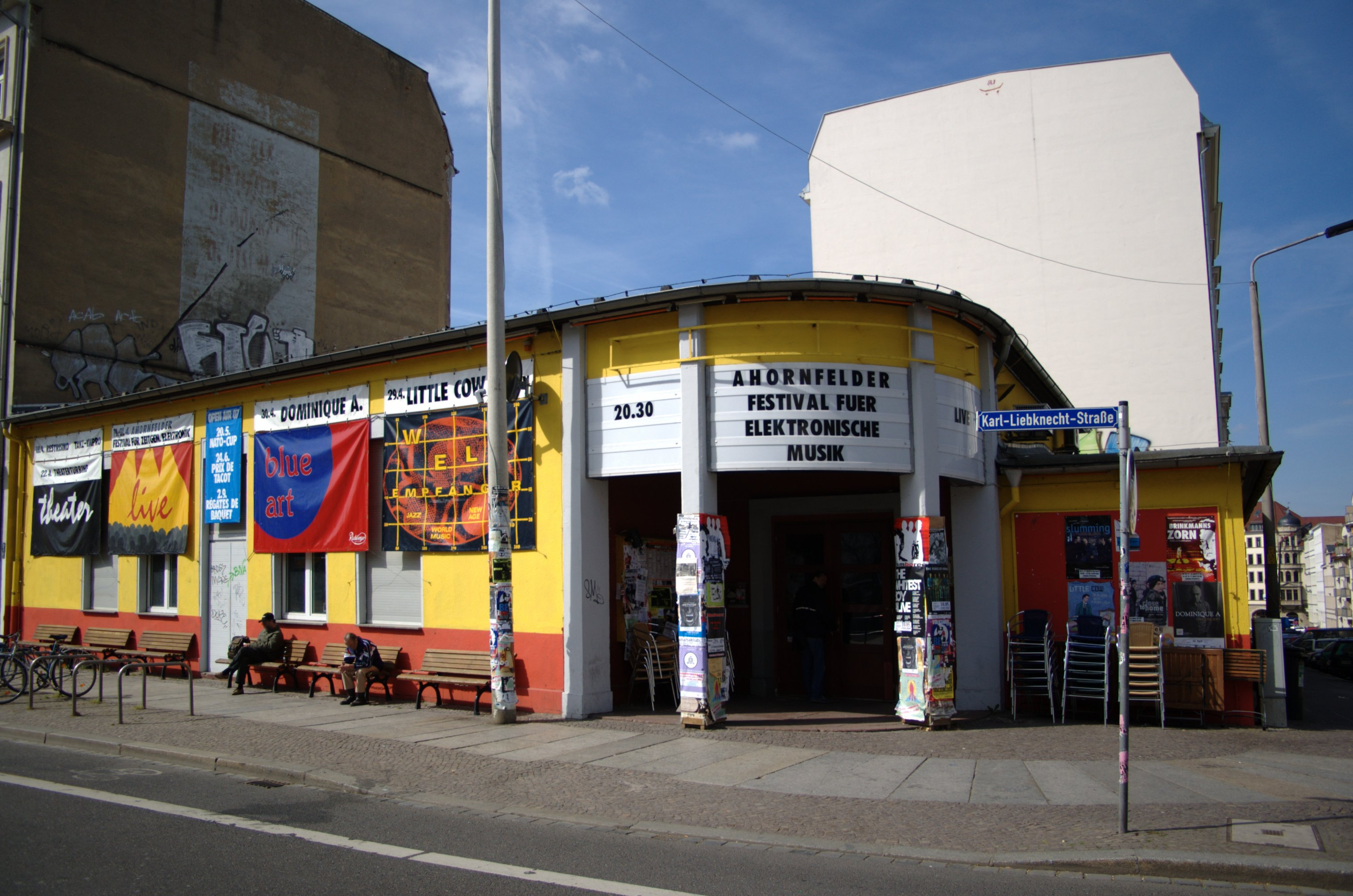 NaTo